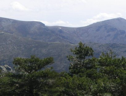 Collado del Piornal (2.074 m), Sierra de Guadarrama, España.